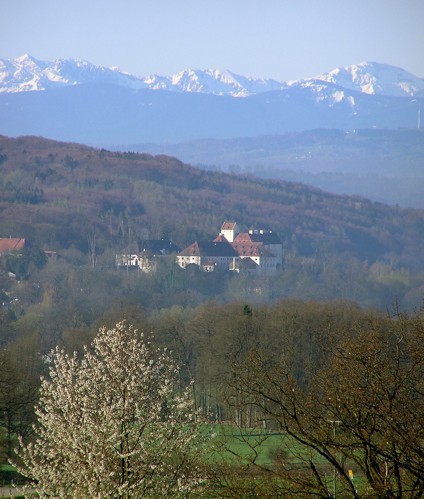 Blick auf Schloss Seefeld